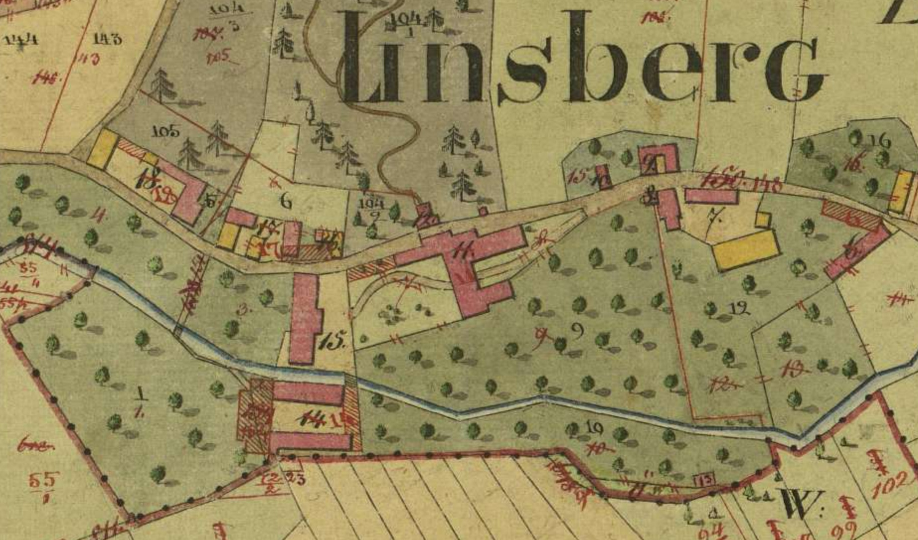 Abbildung des Schlosses Linsberg in Niederösterreich im Franziszeischen Kataster (um 1820)